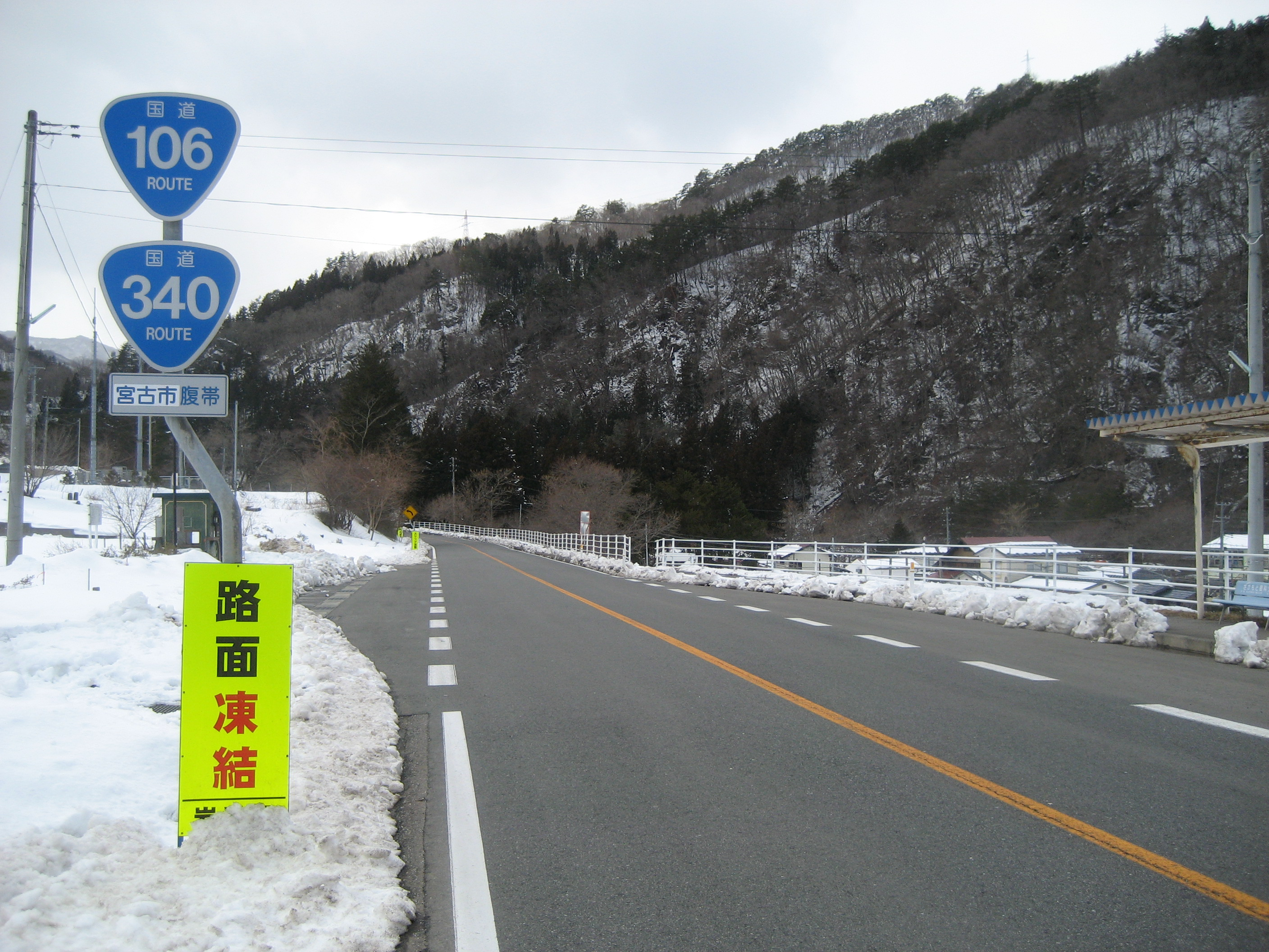 国道106号線岩手県宮古市腹帯付近